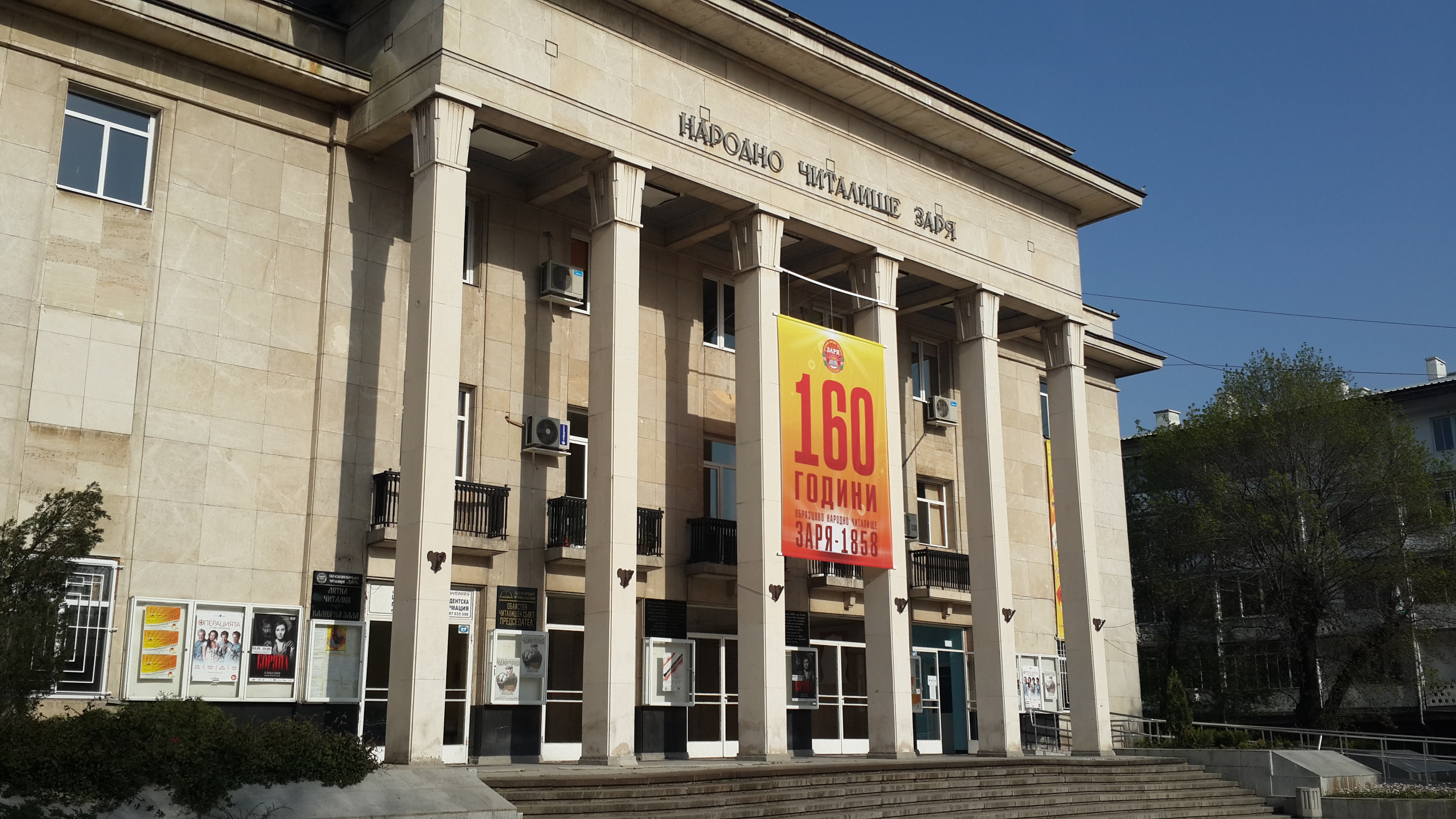 Читалище „Заря-1858“